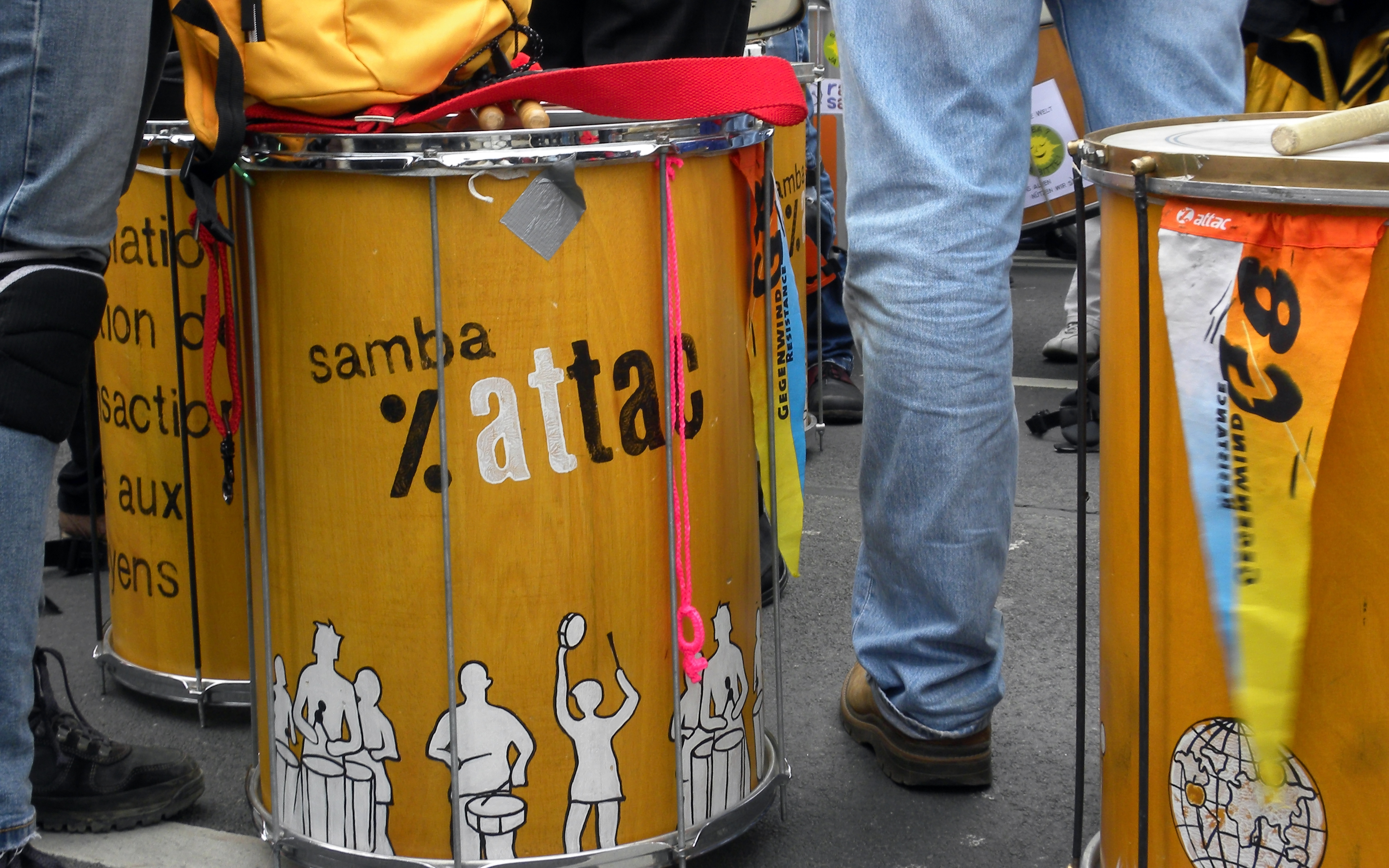 Der 100. Internationale Frauentag wurde in Wien mit einem Aktionstag, zu dem u.a. die Kunstaktion KnitHerStory und eine Demonstration mit Kundgebung gehörte, gefeiert.